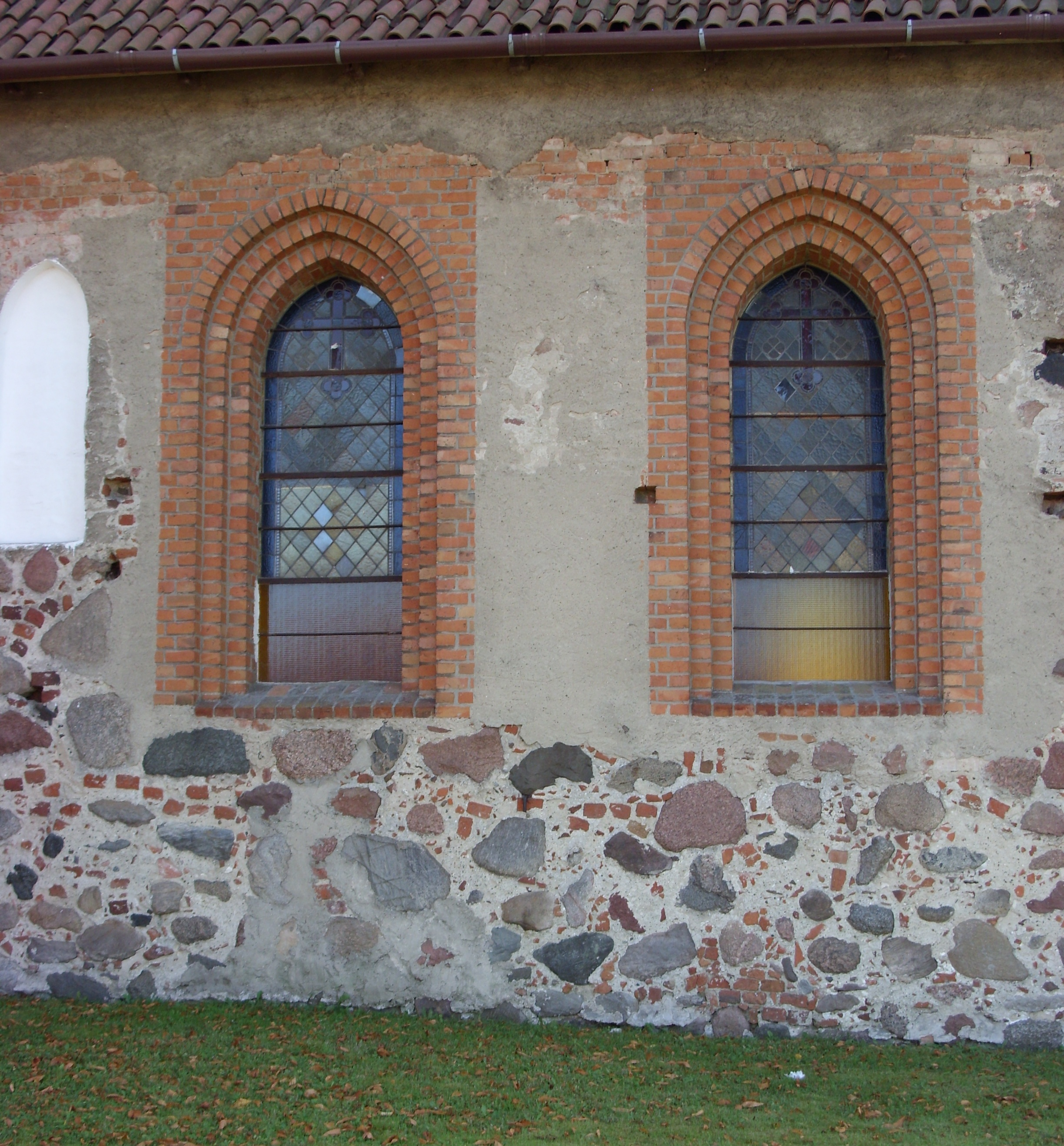 kościół parafialny p.w. św.Jana Chrzciciela nr NID woj. warmińsko-mazurskie 40(Ł/2) z 27.08.1949